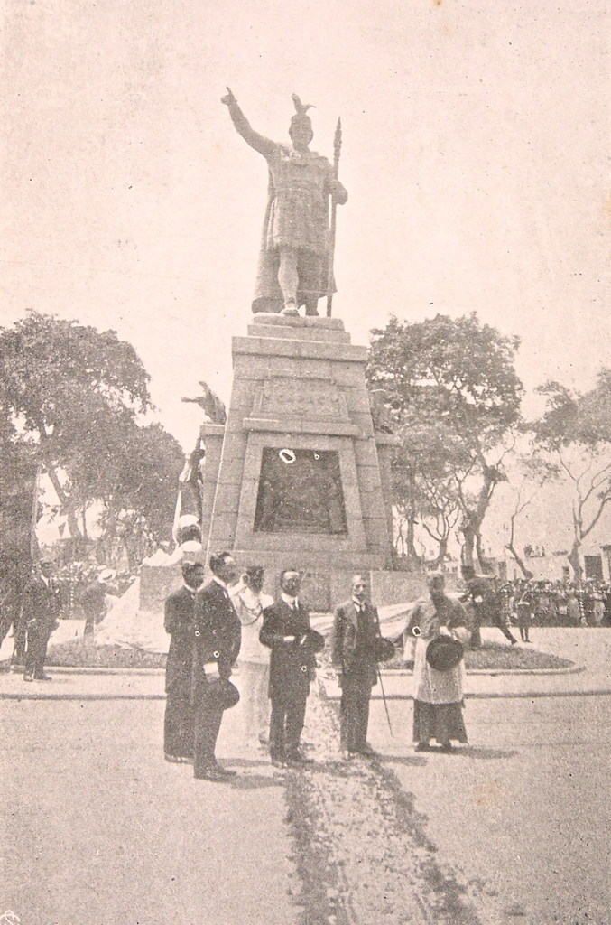 Monumento a Manco Capac el día de su inauguración